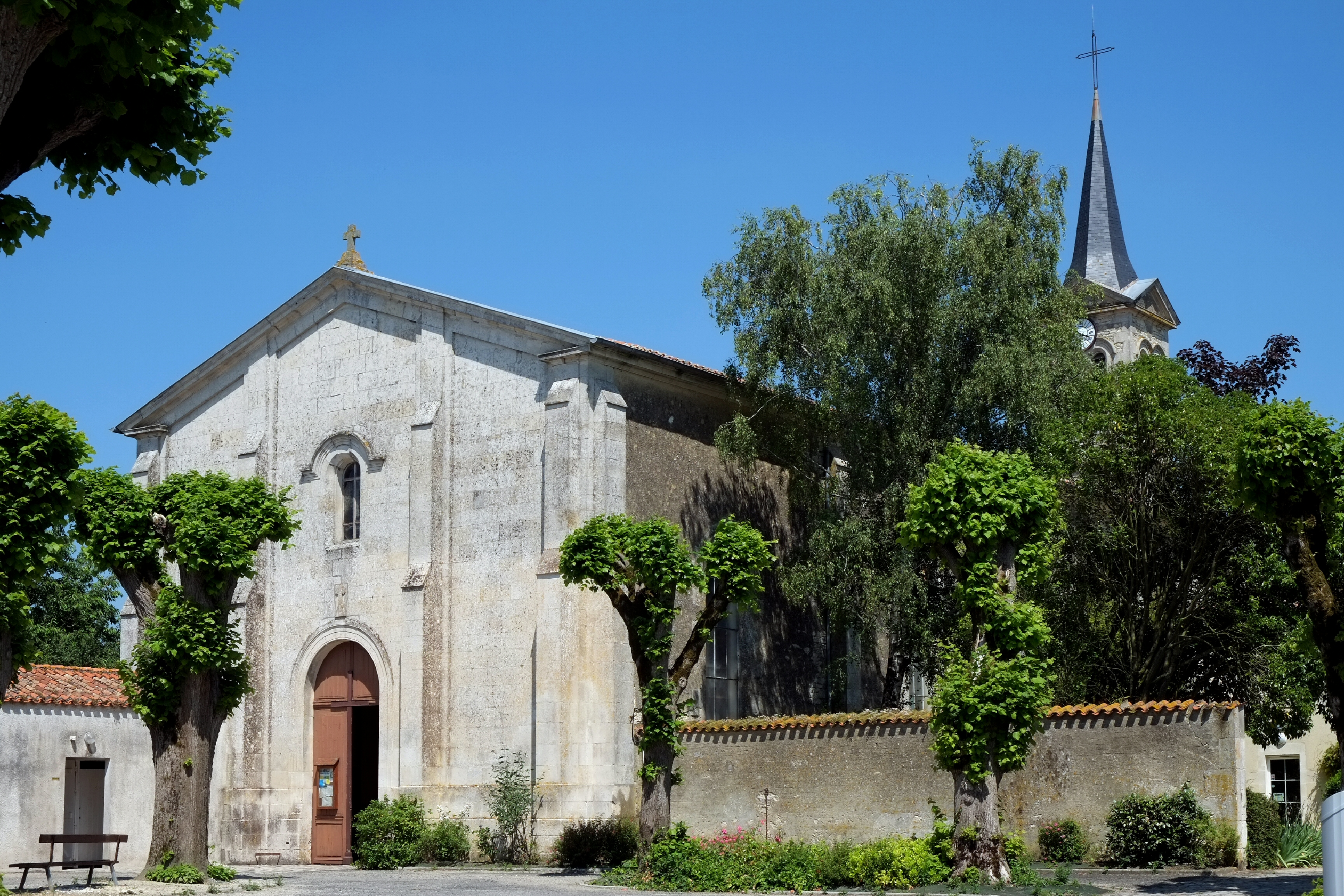 Église Saint-Pierre La Ronde Charente-Maritime France